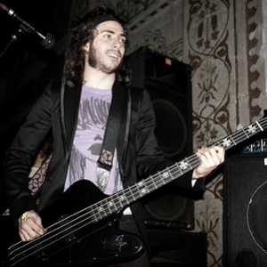 Jay de la Cueva como Bajista